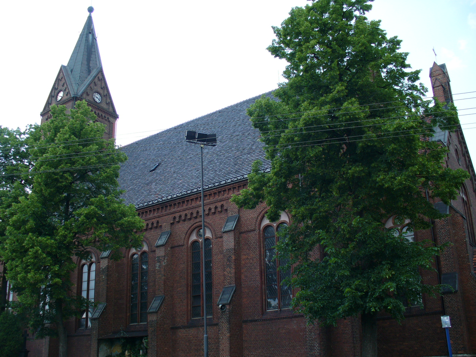 Szywołd - Schönwald - Bojków - Neogotycki kościół pw. Narodzenia Najświętszej Marii Panny z 1904 roku.